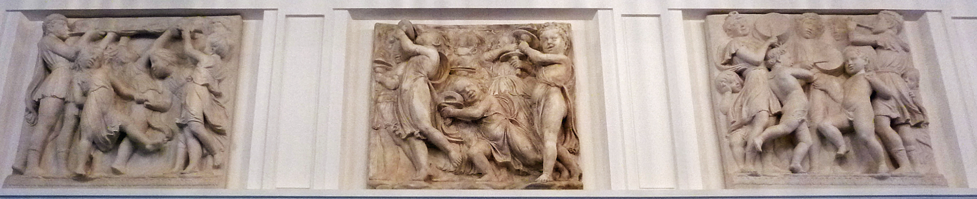 Wandfries im ehemaligen Speisezimmer des Lingnerschlosses in Dresden: (13) Die Tubabläser, (14) Die Zimbelschläger, (15) Die Trommler